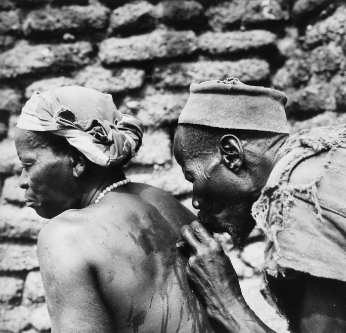 De man is hier bezig met het vacuüm zuigen van de hoorn. Het koppen zetten ('cupping') is een vacuümtherapie dat in combinatie met aderlating kan worden toepast. Bij deze methode wordt plaatselijk bloed aan het lichaam onttrokken. Op de rug bevinden zich diverse reflexpunten, net als op de voetzolen. De genezer maakt bij deze punten enkele sneetjes (hier met een scheermesje) in de huid. Vervolgens zet hij een dierlijke hoorn (zie 3925-189 en 3925-280) op de huid en zuigt het geheel vacuüm door het vlies in de bovenzijde van de hoorn. De huid binnen de hoorn komt bol te staan. Deze methode zorgt voor een plaatselijke verhoogde doorbloeding van de huid en zal daardoor de aderlating bespoedigen. Dit kan pijnverlichtend en genezend werken. Zie voor de totale behandeling inventarisnummers 20010382 tot en met 20010388. De opname is gemaakt tijdens één van de twee verzamelexpedities die het Tropenmuseum in 1970-1971 ondernam ter voorbereiding op de grote tentoonstelling in 1971-1972, getiteld 'Samo. Een Afrikaans Savannevolk in ontwikkeling'. De expedities duurden elk drie maanden en werden uitgevoerd door de heren J.T. Broekhuijse en F.M. Cowan. Een foto van deze behandelsessie staat ook afgebeeld in de catalogus bij de hierboven genoemde tentoonstelling met het bijschrift 'Aderlaten wordt nog veel toegepast om bepaalde ziekten te bestrijden' (1971: 34).